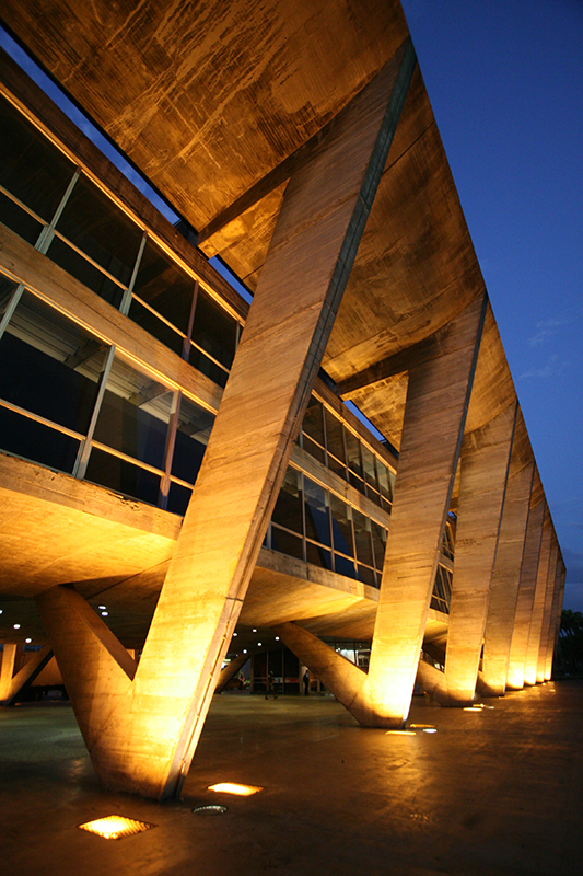 Museu de Arte Moderna | Rio de Janeiro